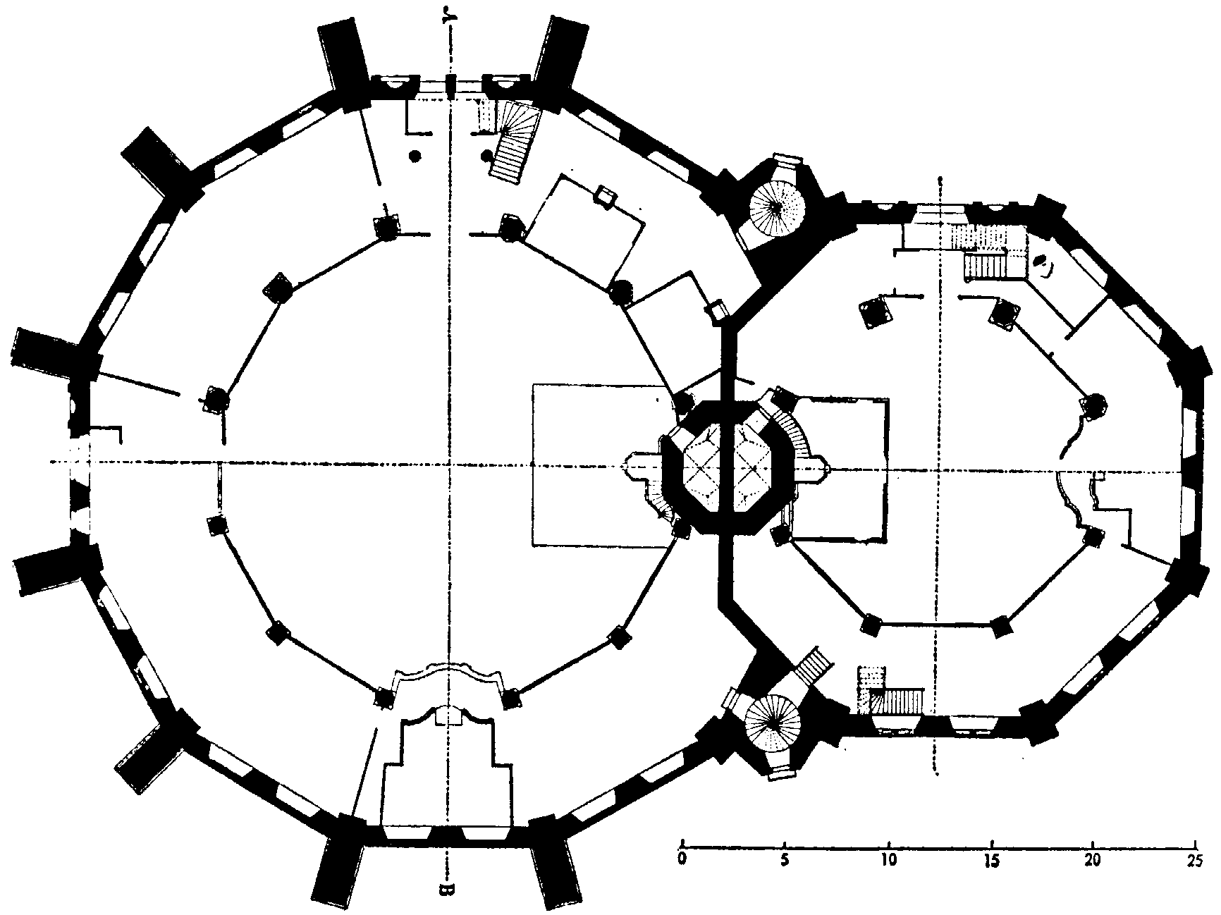 Grundriß der wallonisch-niederländischen Doppelkirche